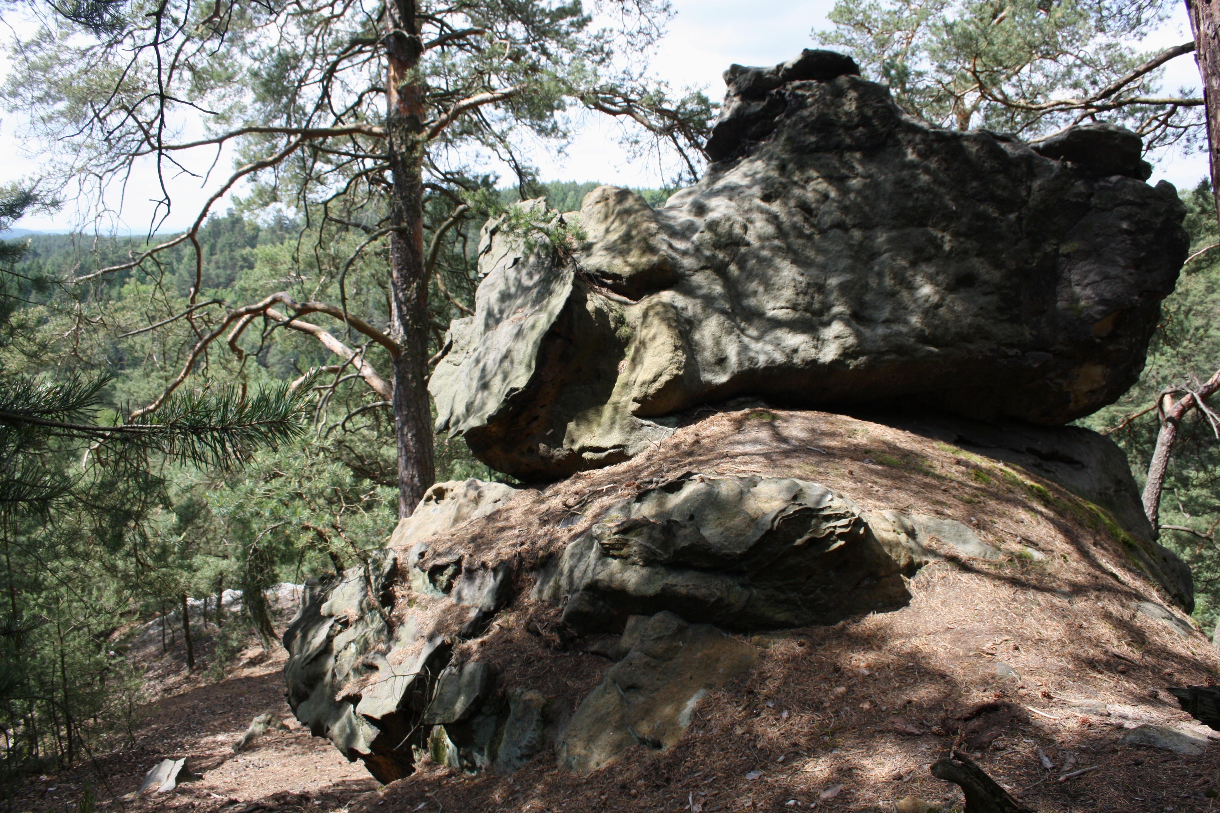 Kostelecké bory